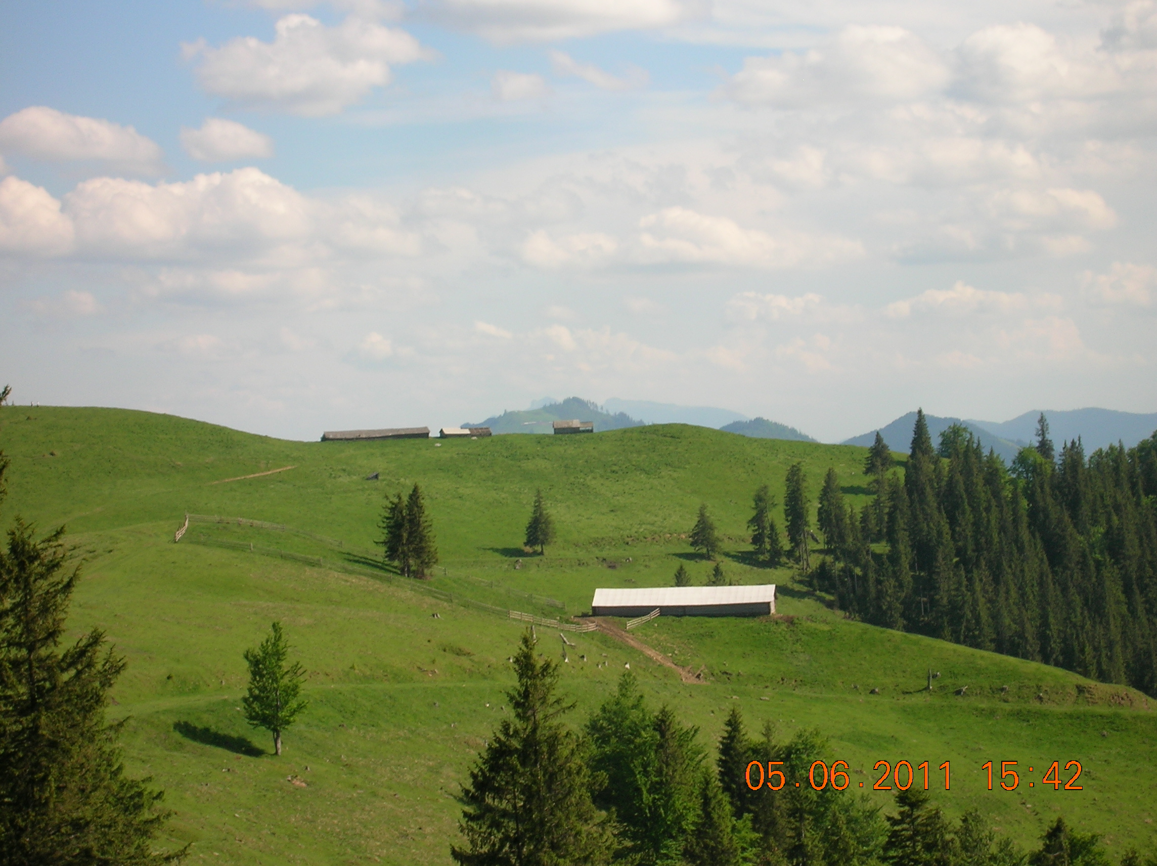 Munţii Stânişoarei (Carpaţii Orientali, România)-Vedere înspre sud din Pasul Stânişoara. În fundal se află Ceahlăul.